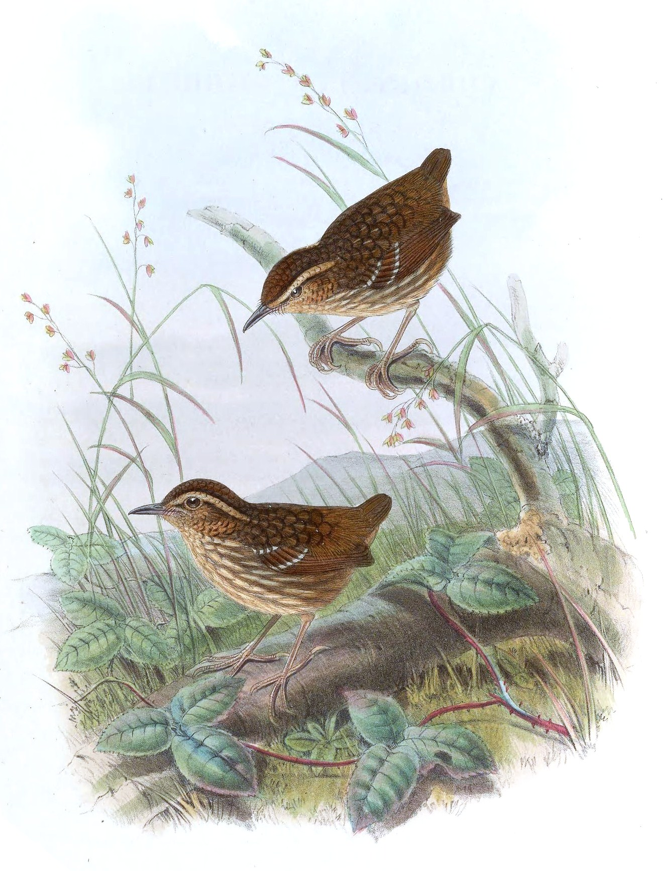 Turdinulus roberti = Napothera epilepidota